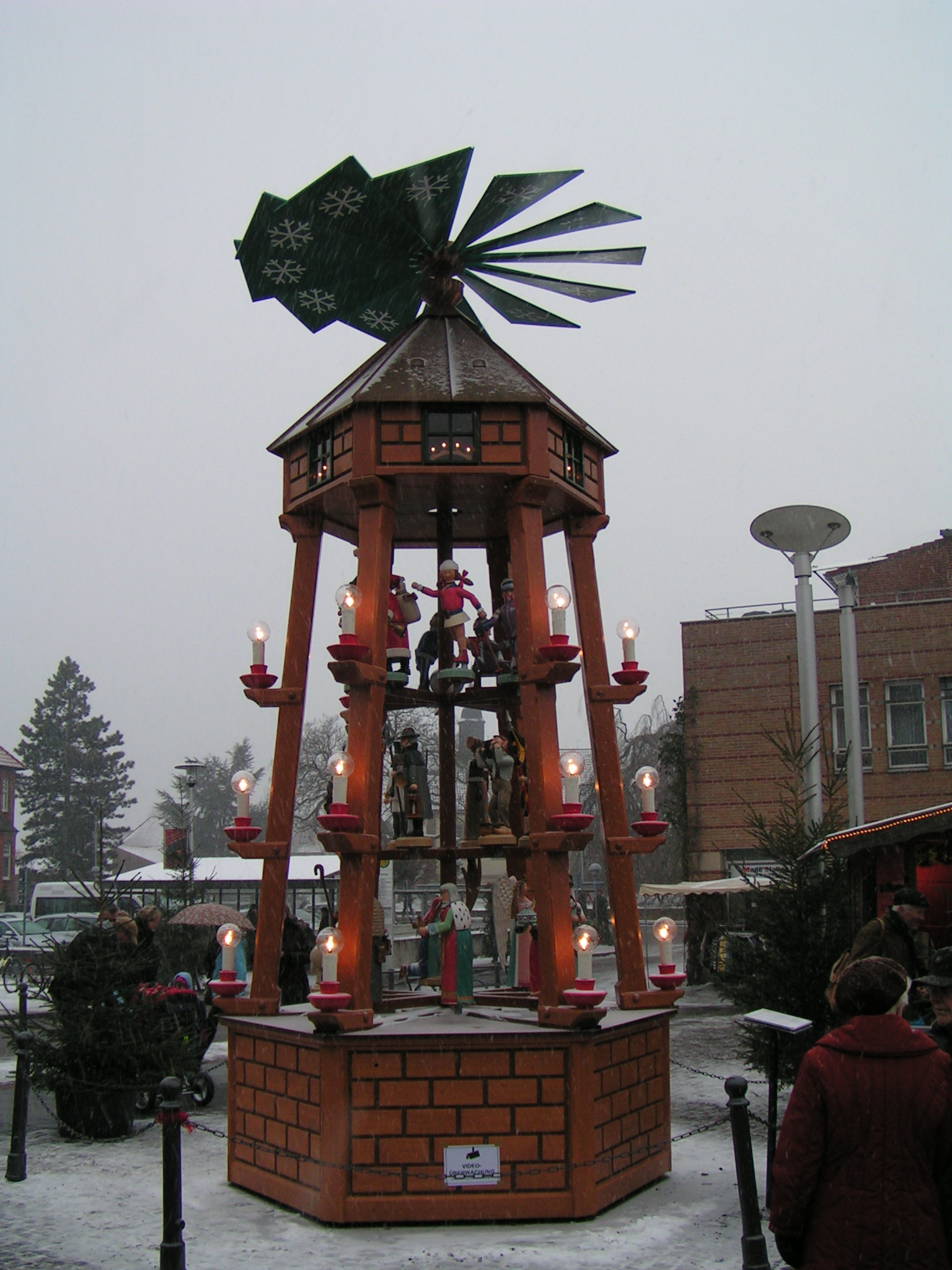 Weihnachtspyramide auf dem Weihnachtsmarkt Bad Bentheim, die von der Partnerstadt Wolkenstein im Erzgebirge gestiftet wurde